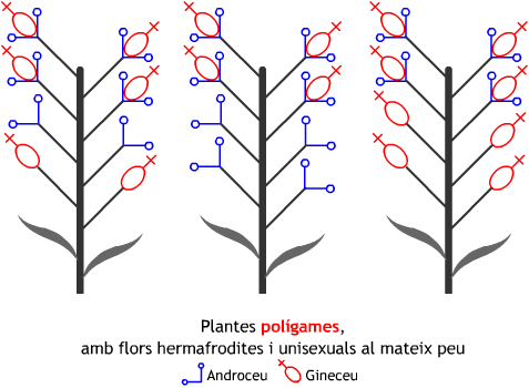 Esquema de distribució de les flors a les plantes polígames.